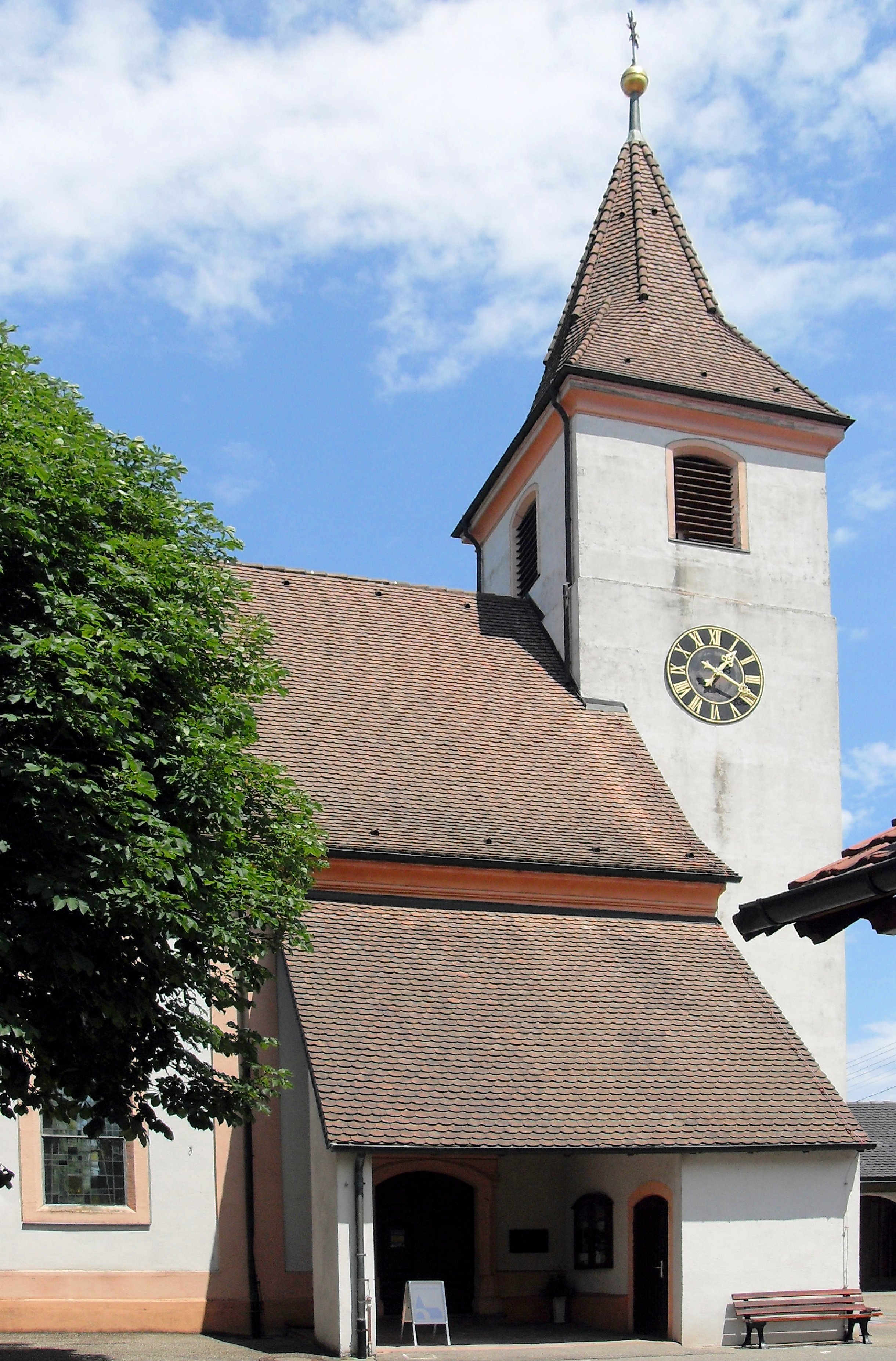 Evangelische Kirche in Königschaffhausen, Stadt Endingen am Kaiserstuhl, Deutschland